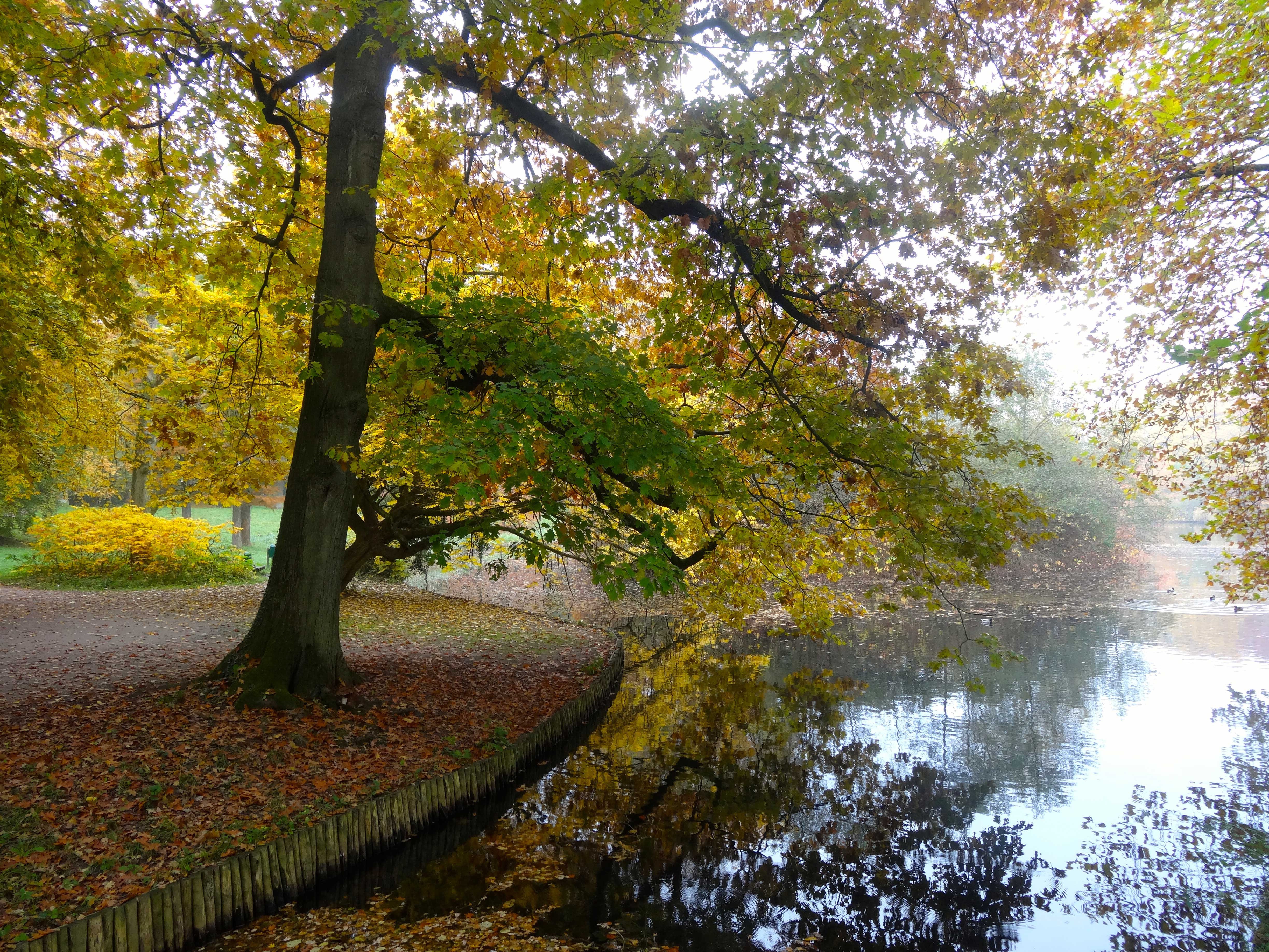 Het Engelsche Werk in Zwolle